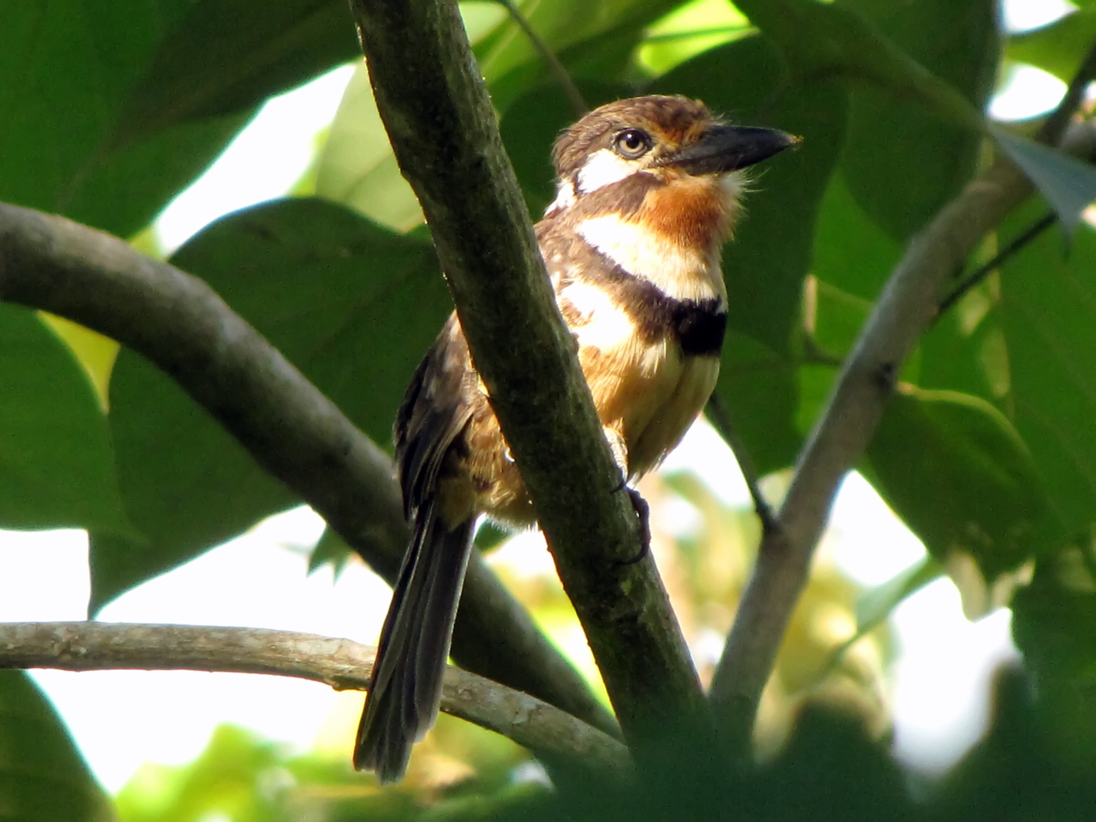 El bobito, encantador, nos posó cuanto necesitamos para que nos quedara bien registrado.